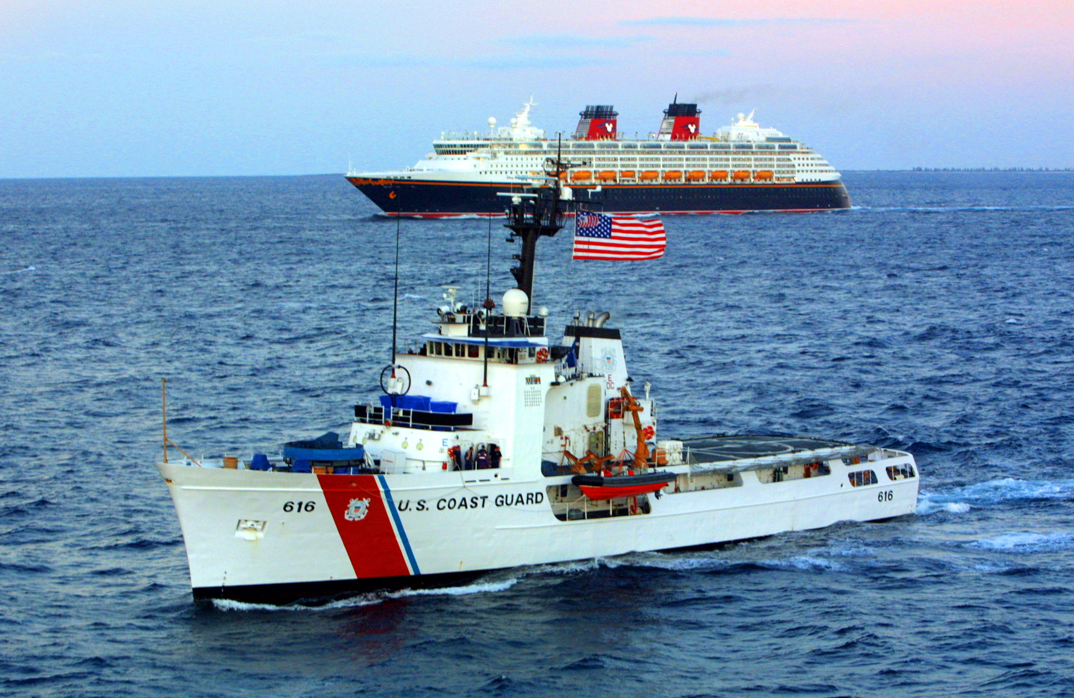 USCGC Diligence (WMEC-616)